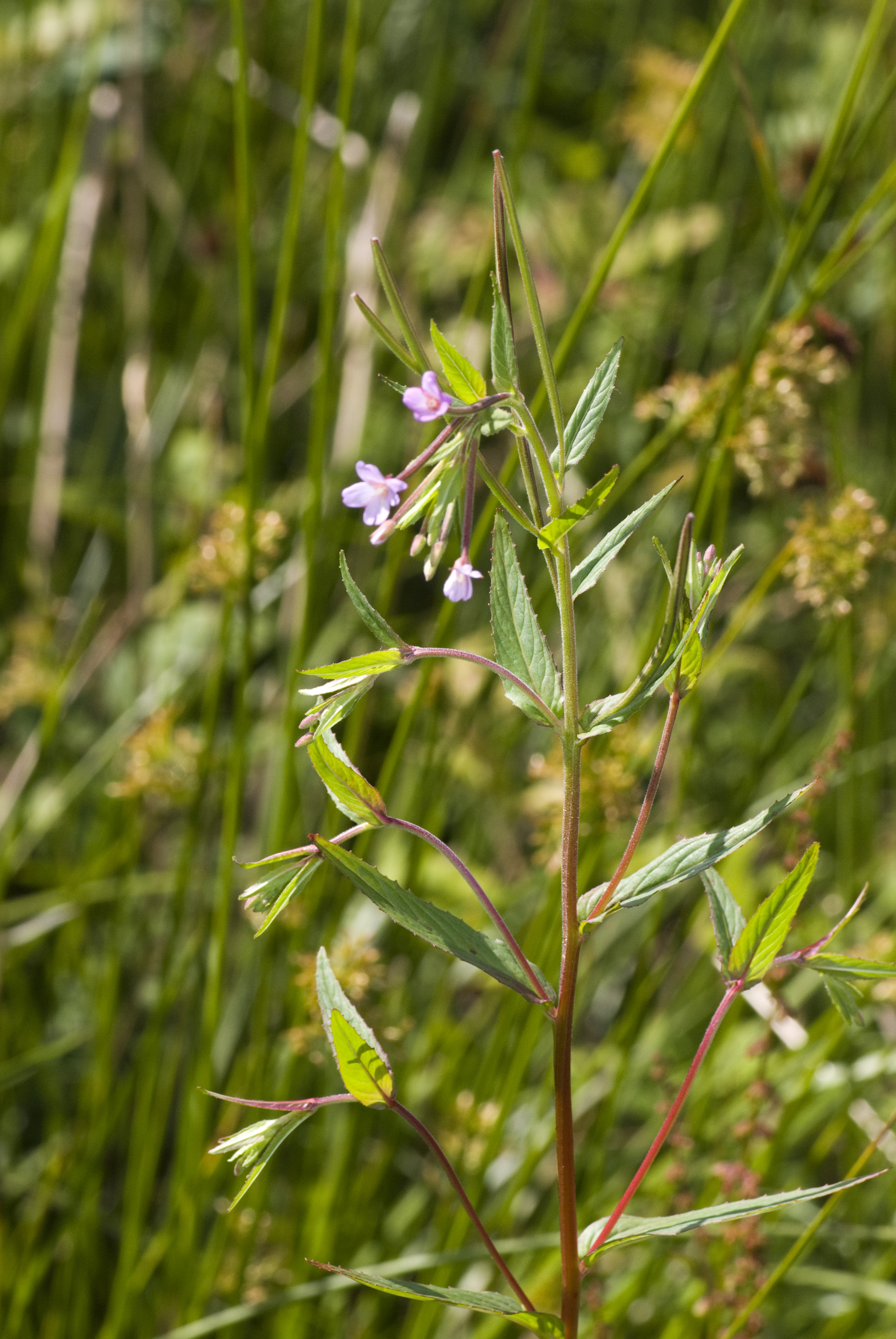 Epilobium ciliatum, Forêt d'Eu (Seine-Maritime), France.